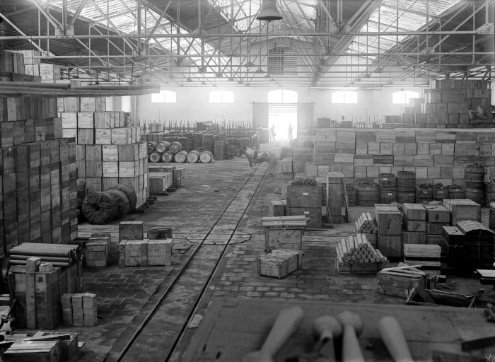 Negatief. Magazijn van de ijzerwarenfabriek Schlieper, Batavia